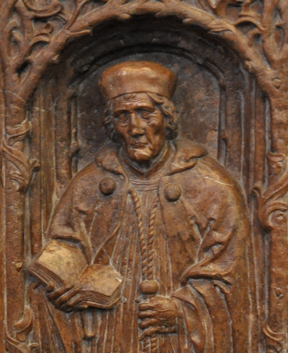 Stuttgart, Stiftskirche, Epitaph des Kanzlers und Stiftspropsts Ludwig Vergenhans († 1512), Bruder des Johannes Nauclerus (eigtl. Vergenhans), aus rotem Marmor; im Chor der Stiftskirche, Ausschnitt